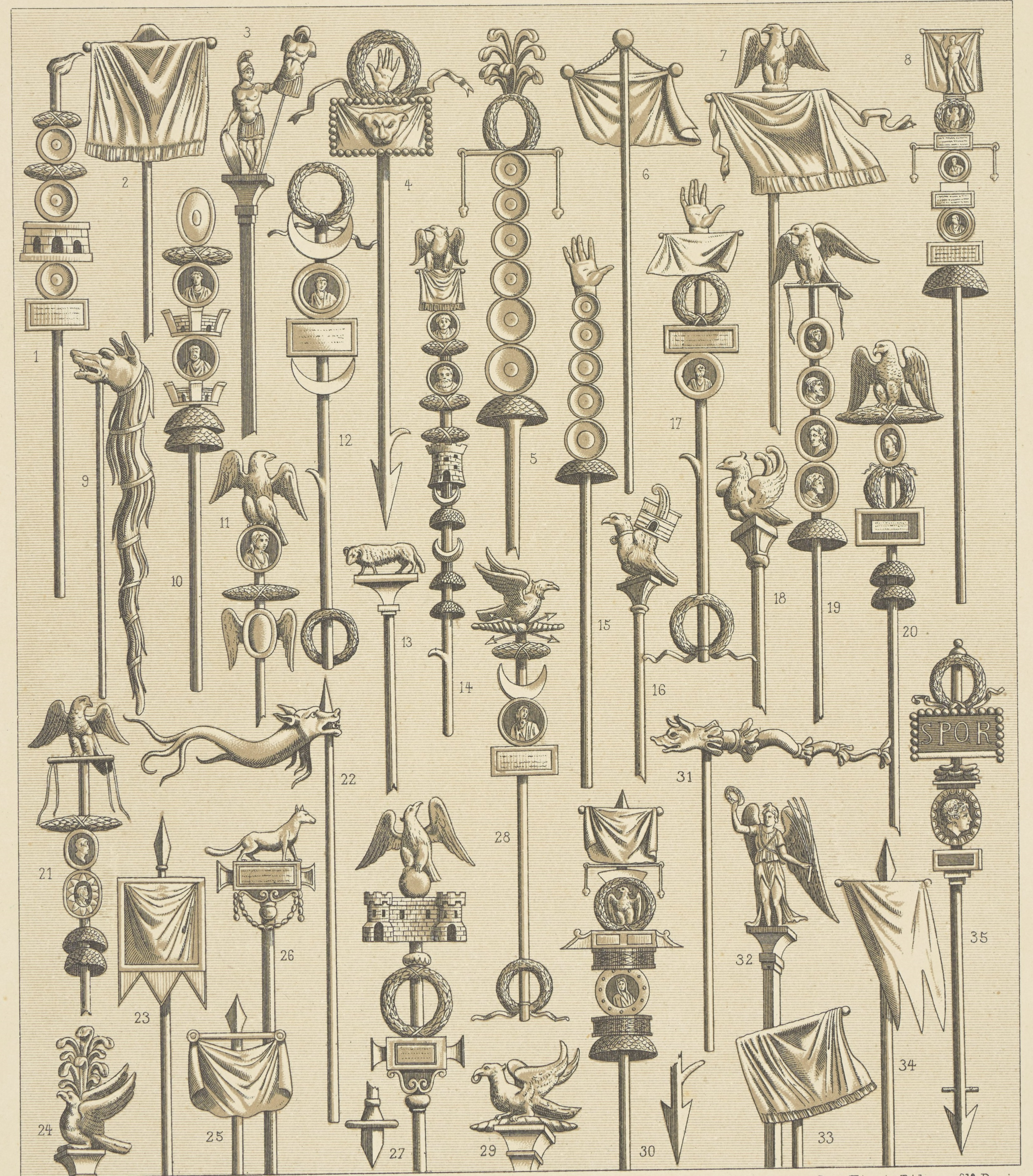 Enseignes militaires / [A. Racinet]